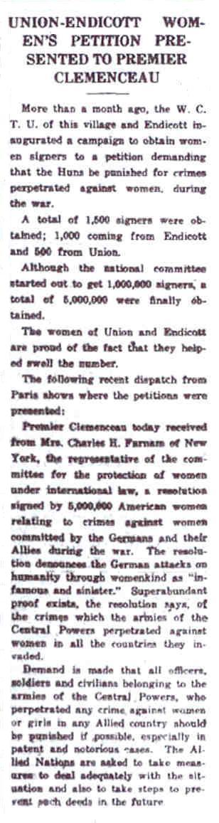 Article rapportant la remise à Georges Clemenceau de la pétition contre le viol de guerre signée par cinq millions de femmes américaines.